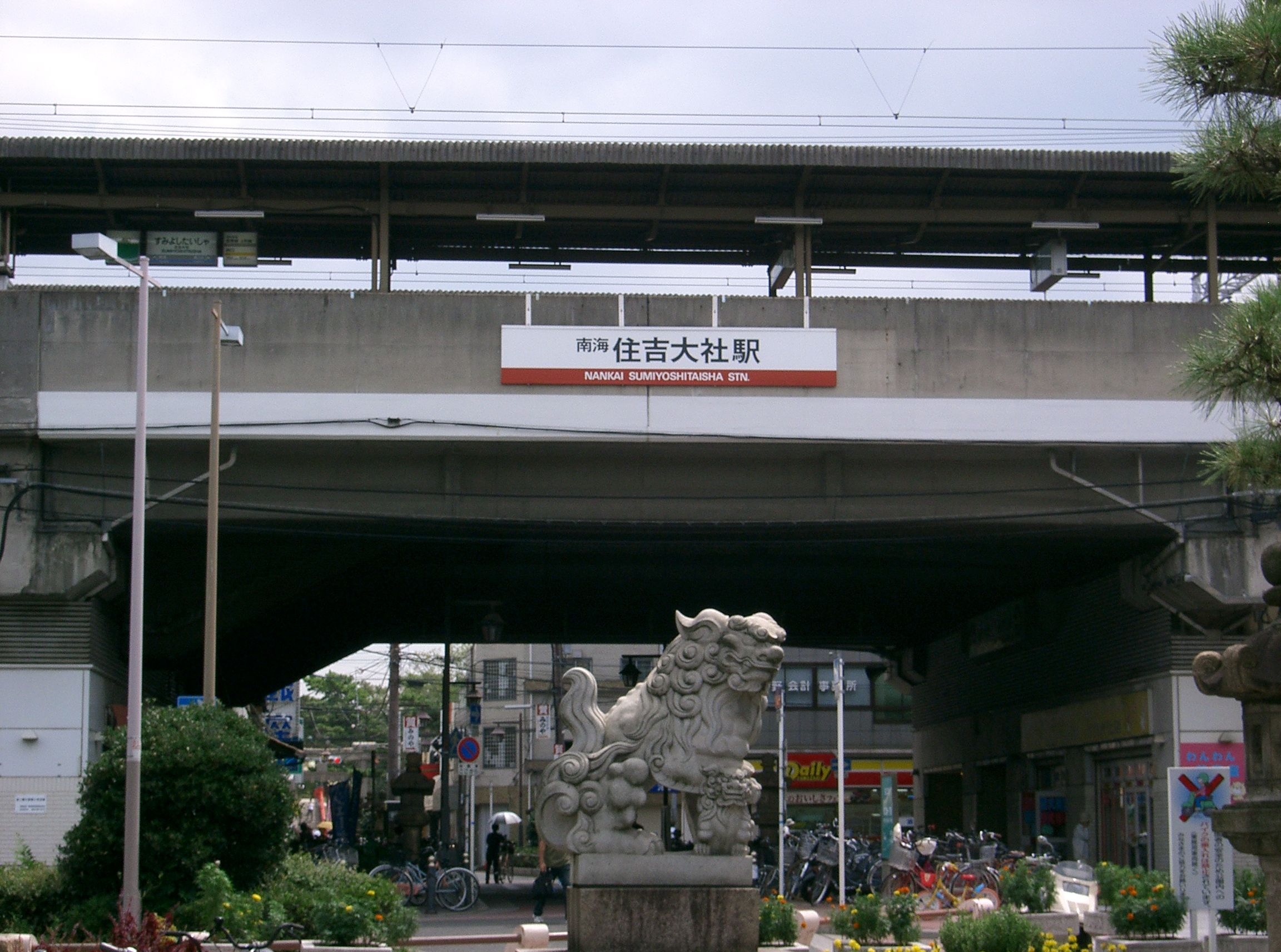 住吉大社駅